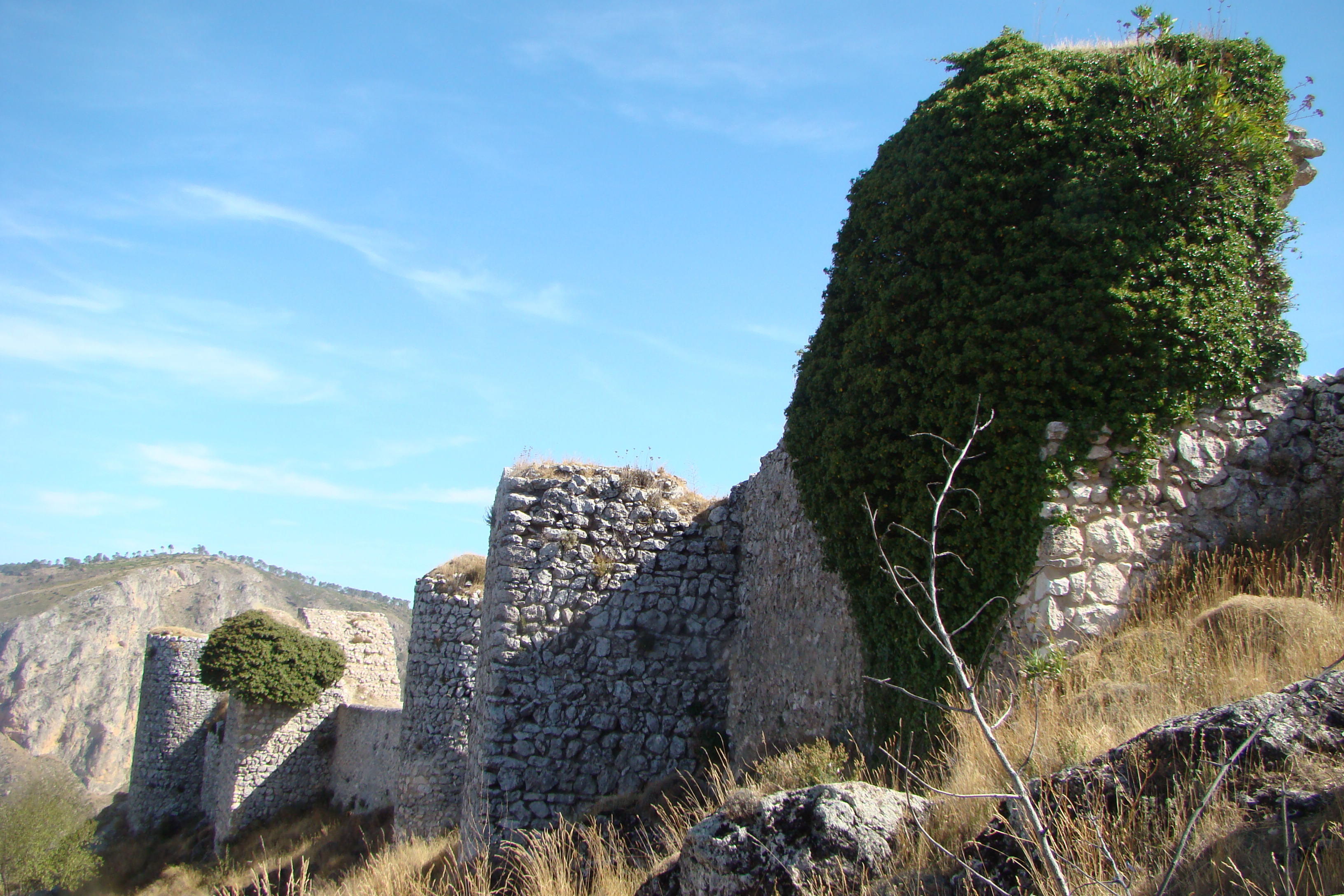 Muralla norte del Castillo de Moclín